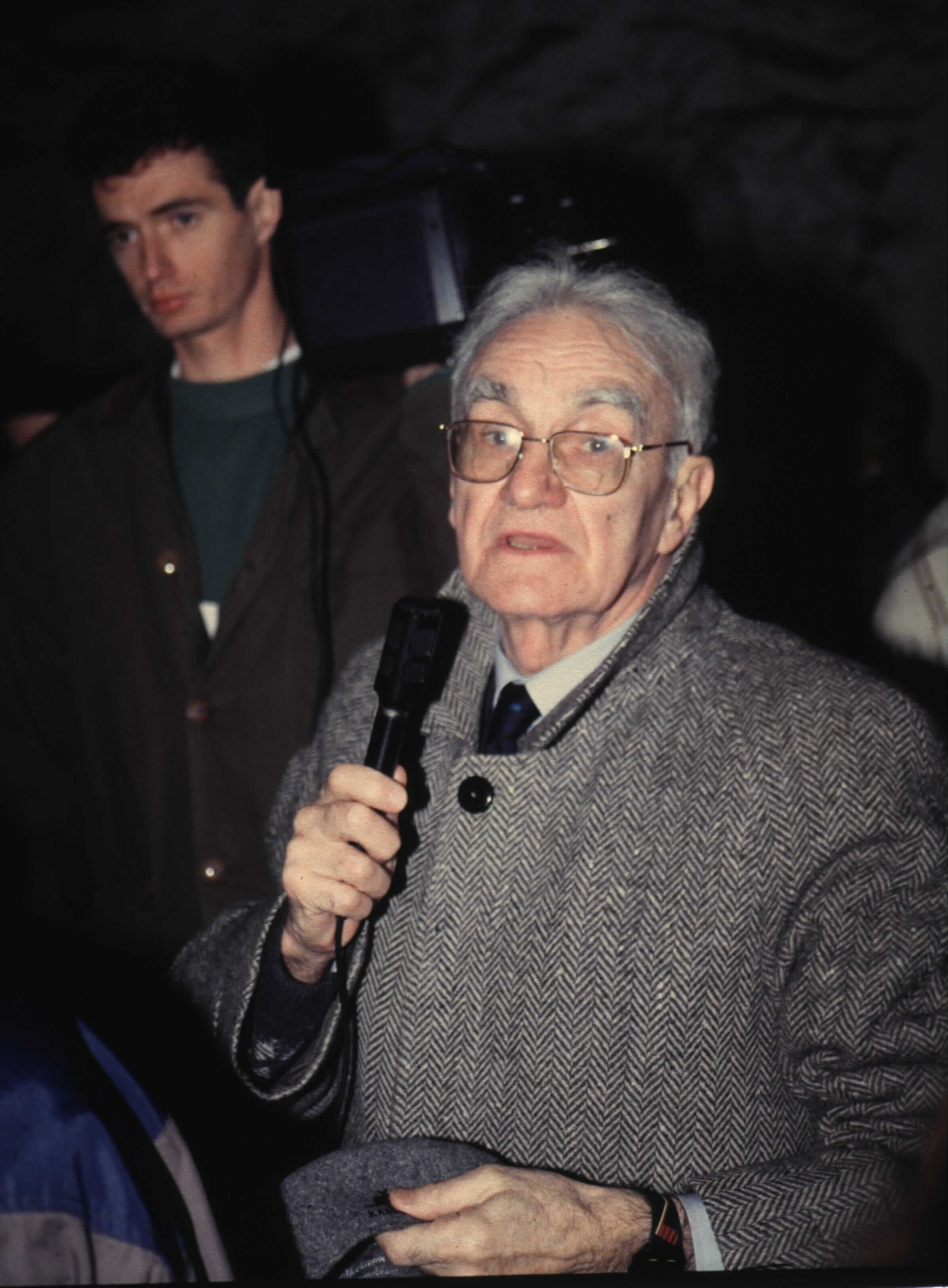 Jean Mialet, Präsident des Euro-Comités Dora-Ellrich-Harzungen am 11. April 1995 im A-Stollen von Mittelbau-Dora